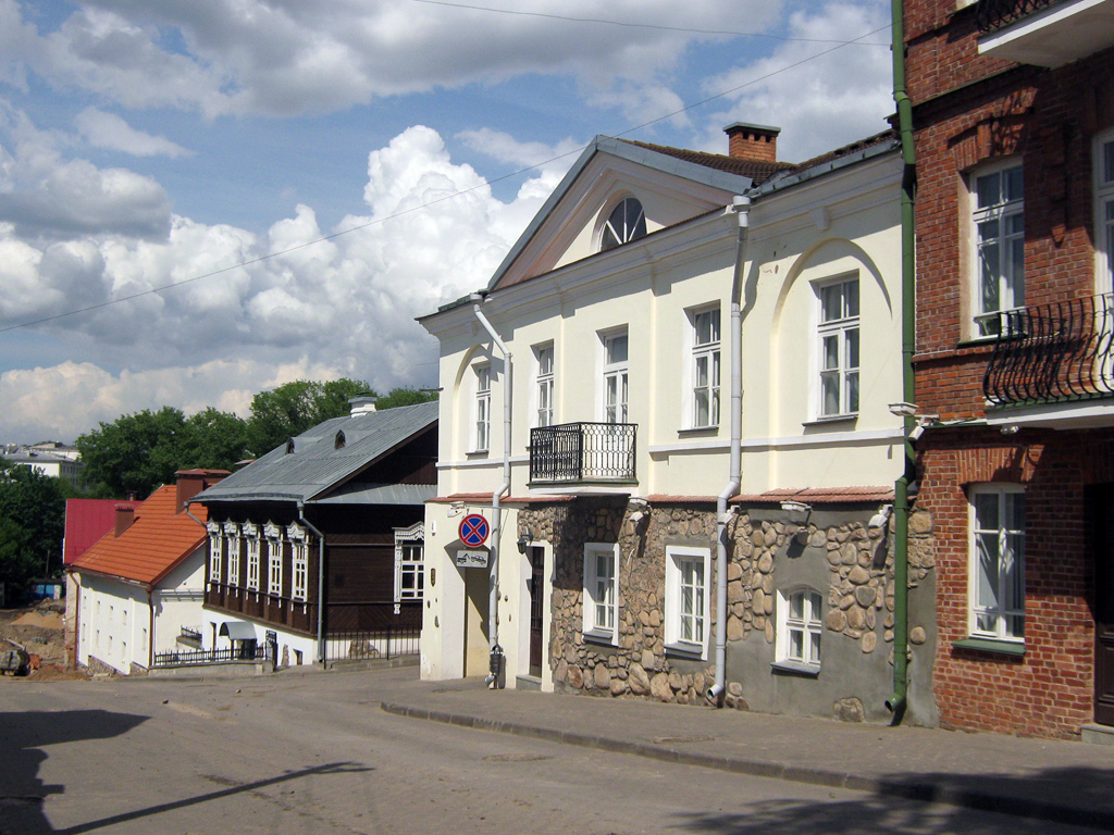 Мінск. Вуліца Герцэна, 4